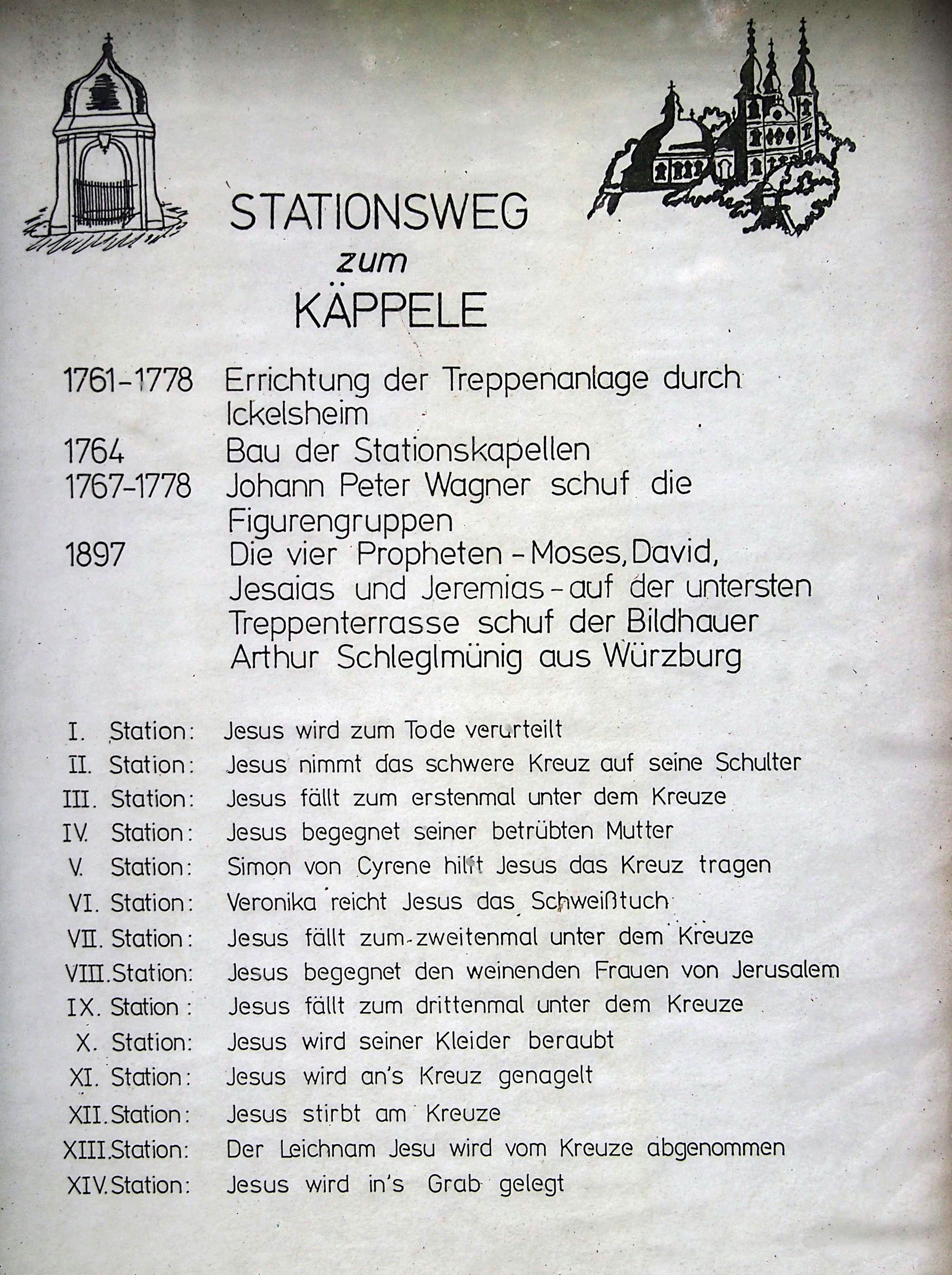 Stationsweg zum Käppele mit Baudaten und Auflistung der 14 Stationen